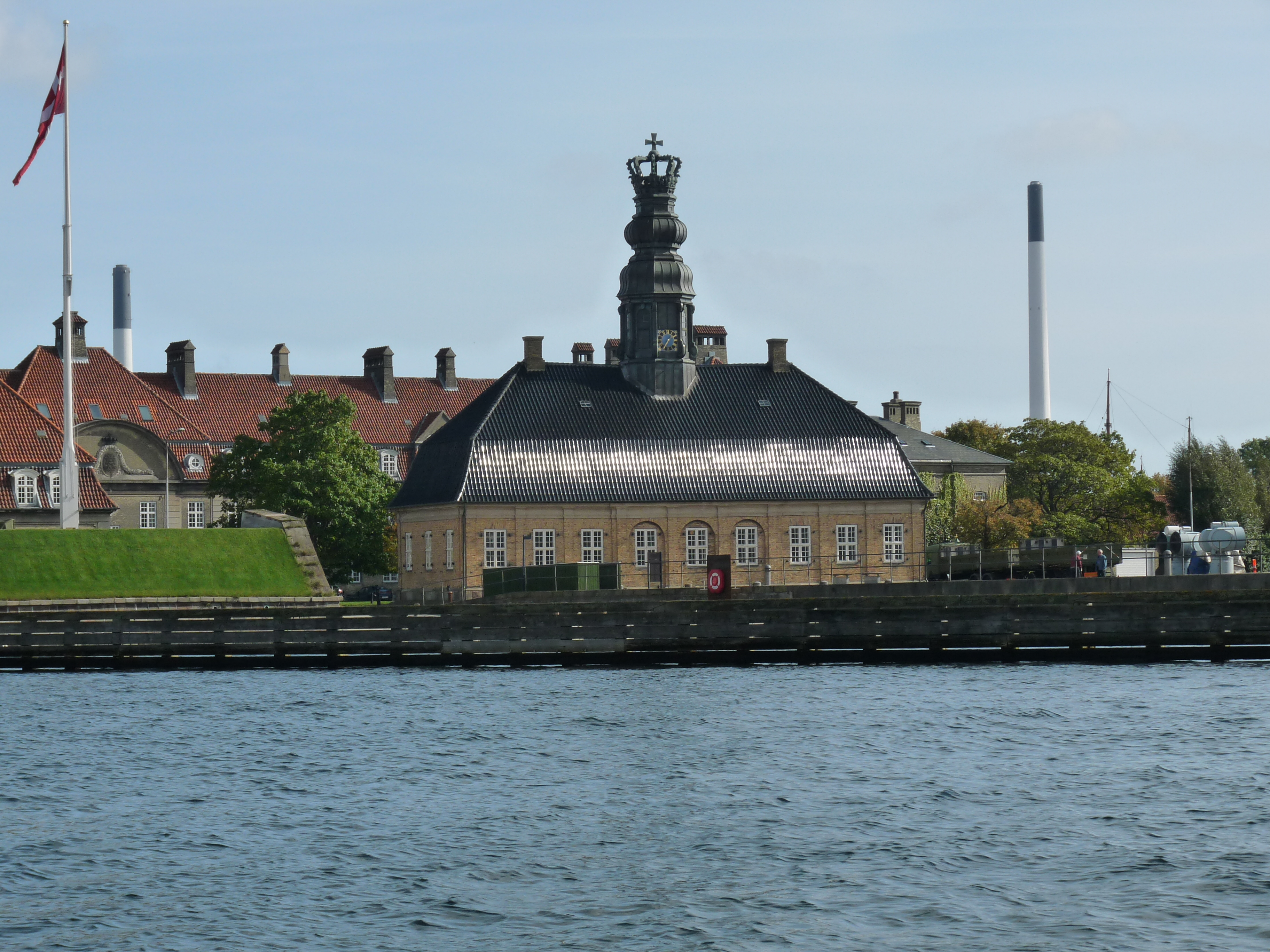 Hovedvagten (Central Guardhouse) at Holmen in Copenhagen, Denmark